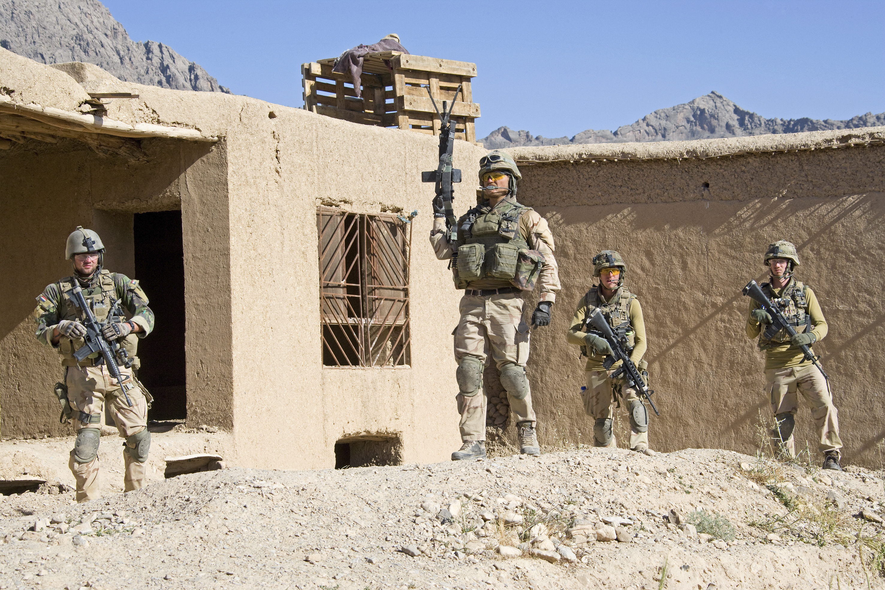 Afghanistan,Uruzgan , 7 juni 2009. Search in quala waar later een shura wordt gehouden.